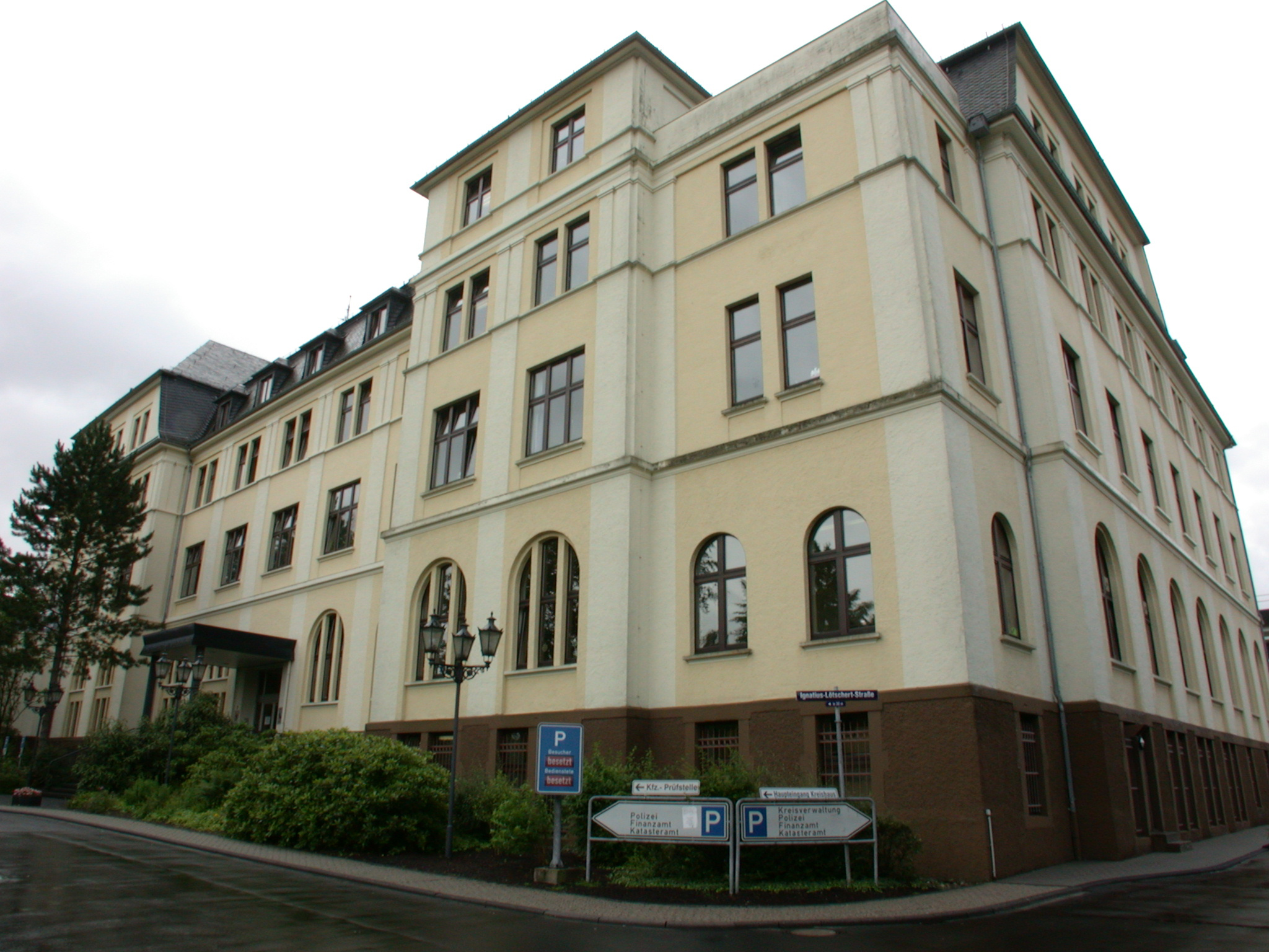 Kreishaus des Westerwaldkreises, Montabaur